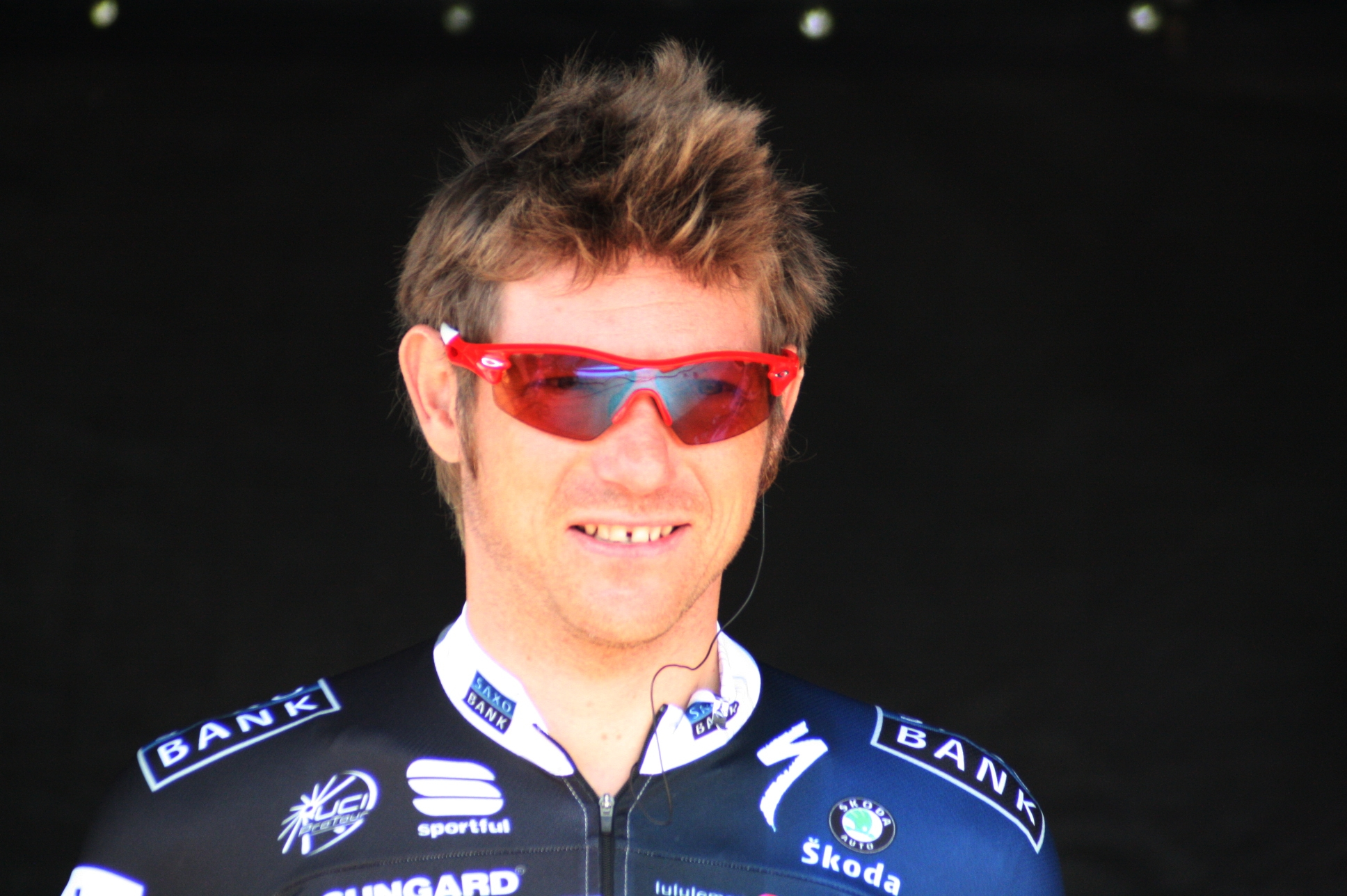 Frank Hoj lors de la présentation des équipes des 4 jours de Dunkerque 2010